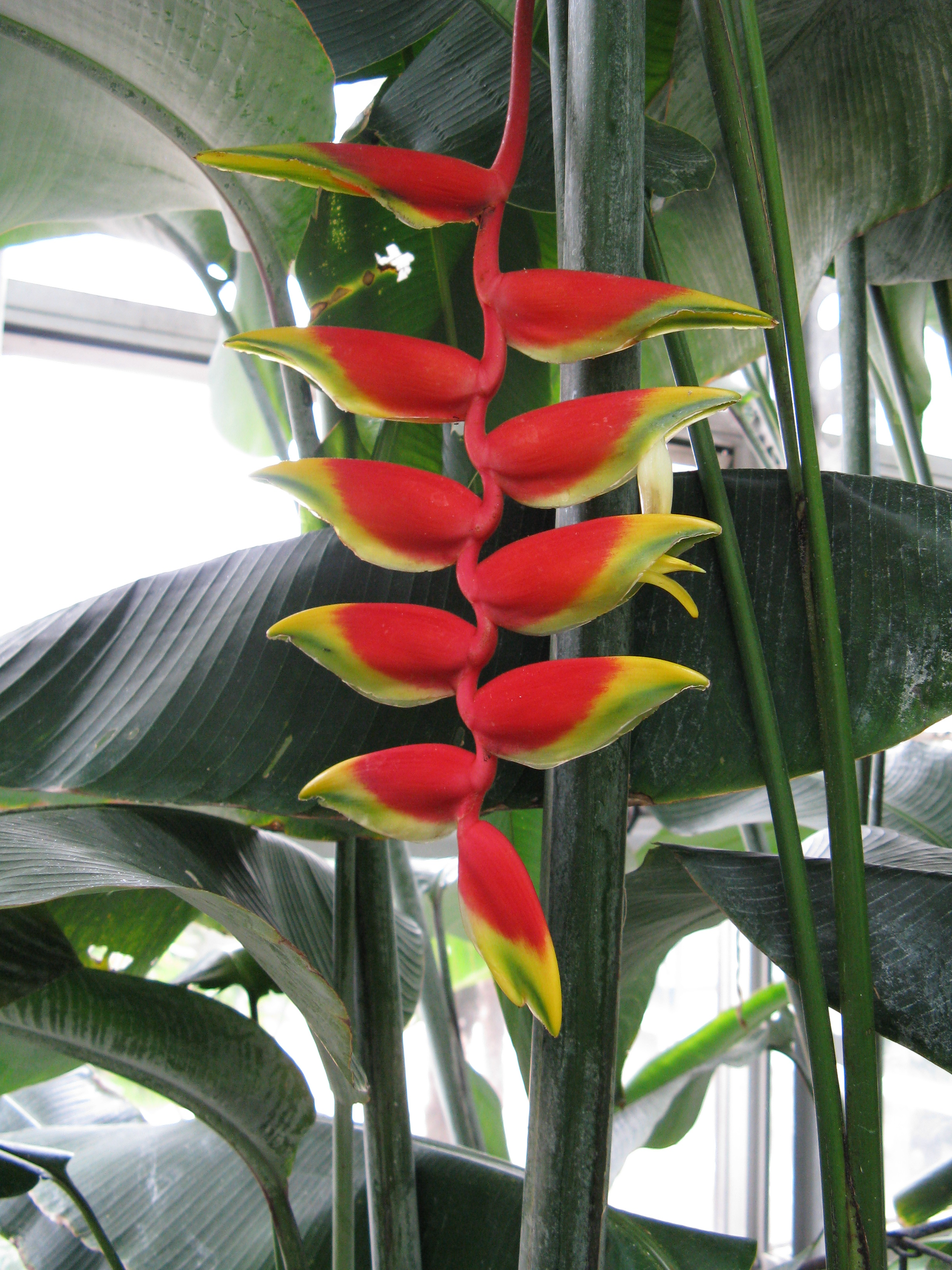 Scientific name Heliconia rostrata Place: Sakuya Konohana Kan, Osaka, Japan